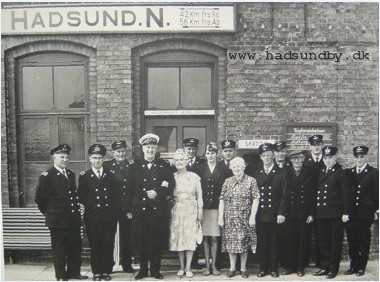 Stationsforstander Kaj Erichsen fotograferet sammen med det imponerende personale på stationen ved hans 25 års jubilæum i 1968.